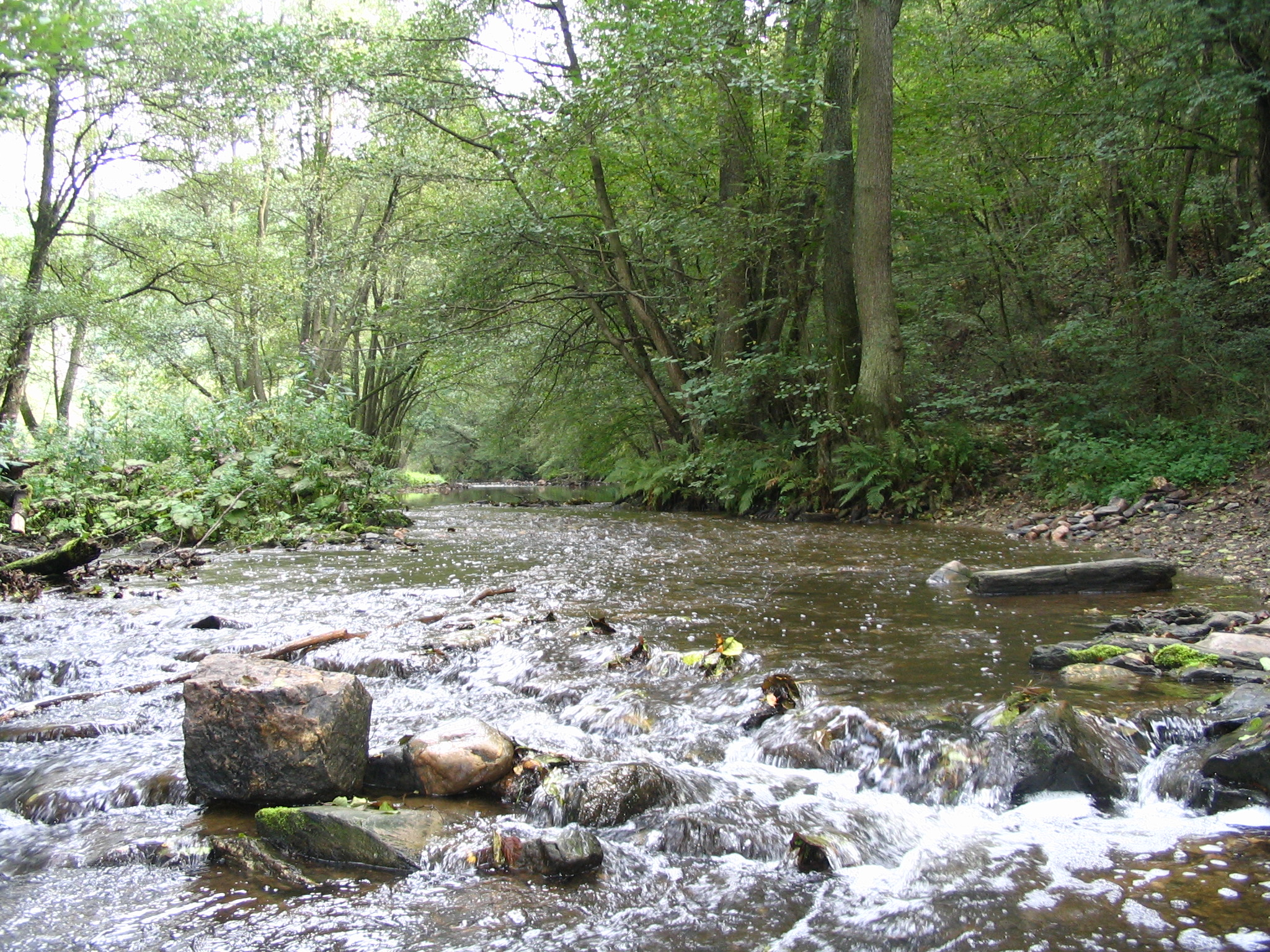 Hahnenbach bei der Ruine der Schleifmühle Götzenau